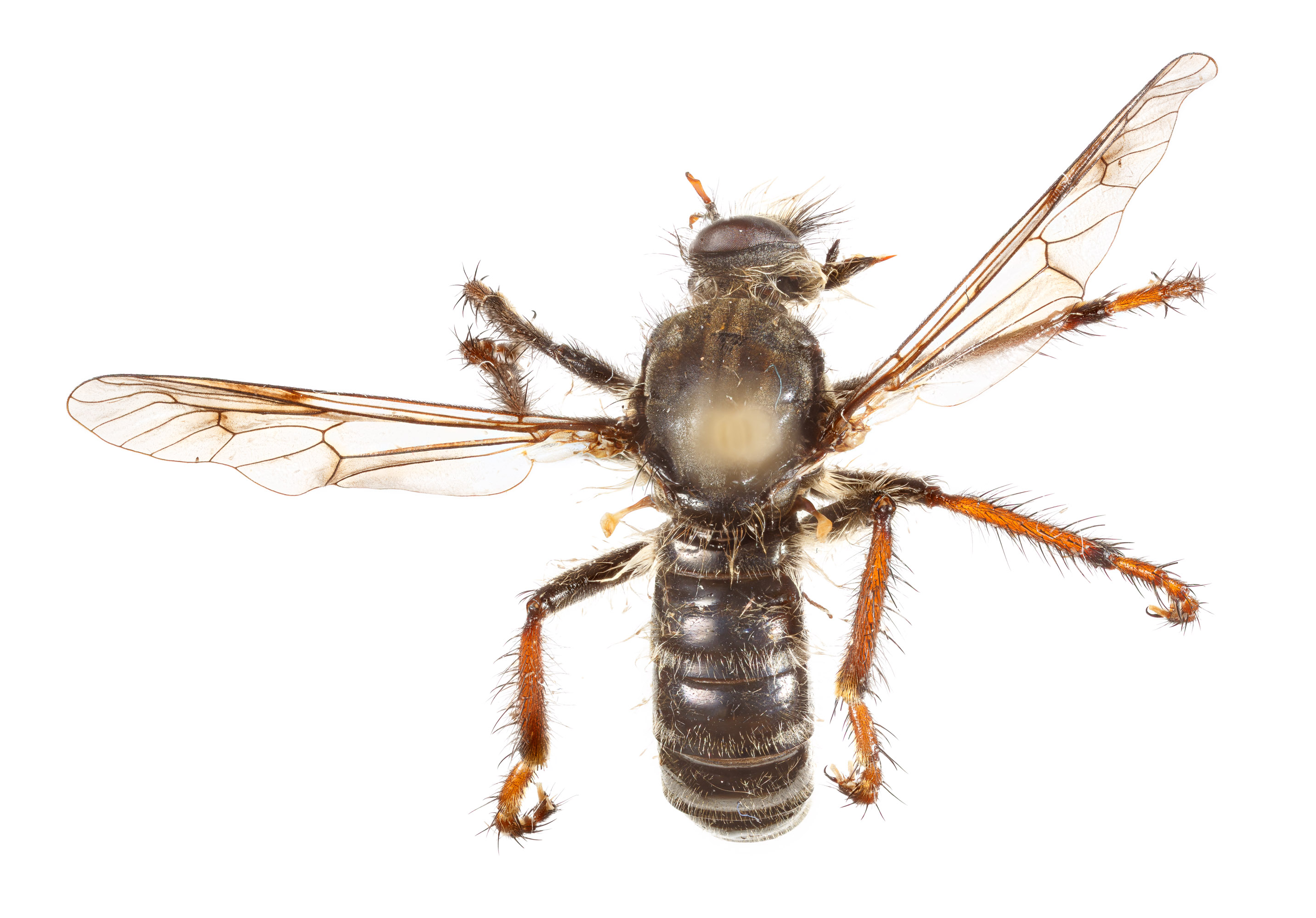 Cyrtopogon luteicornis, male